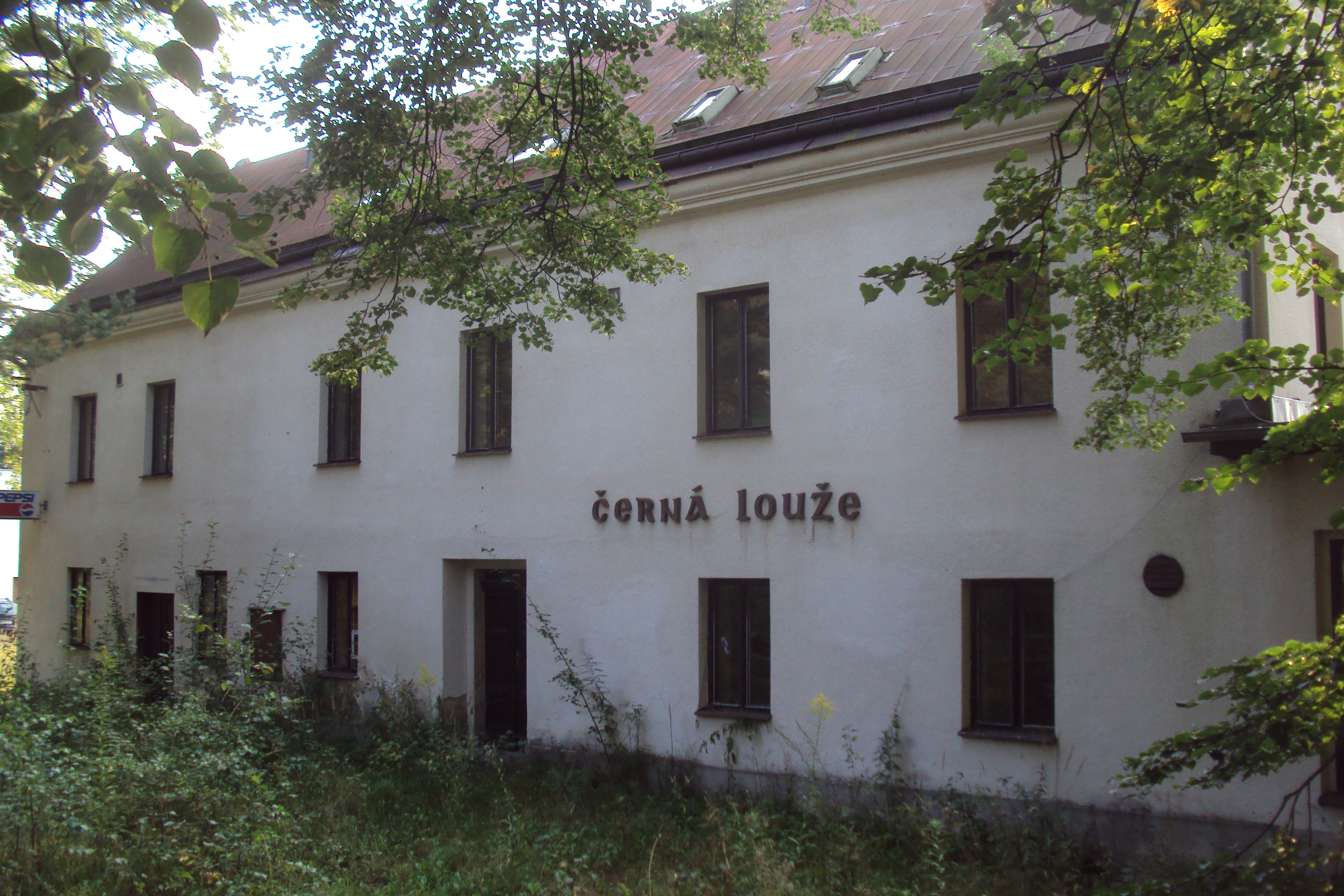 Zrušená hospoda v Černé Louži